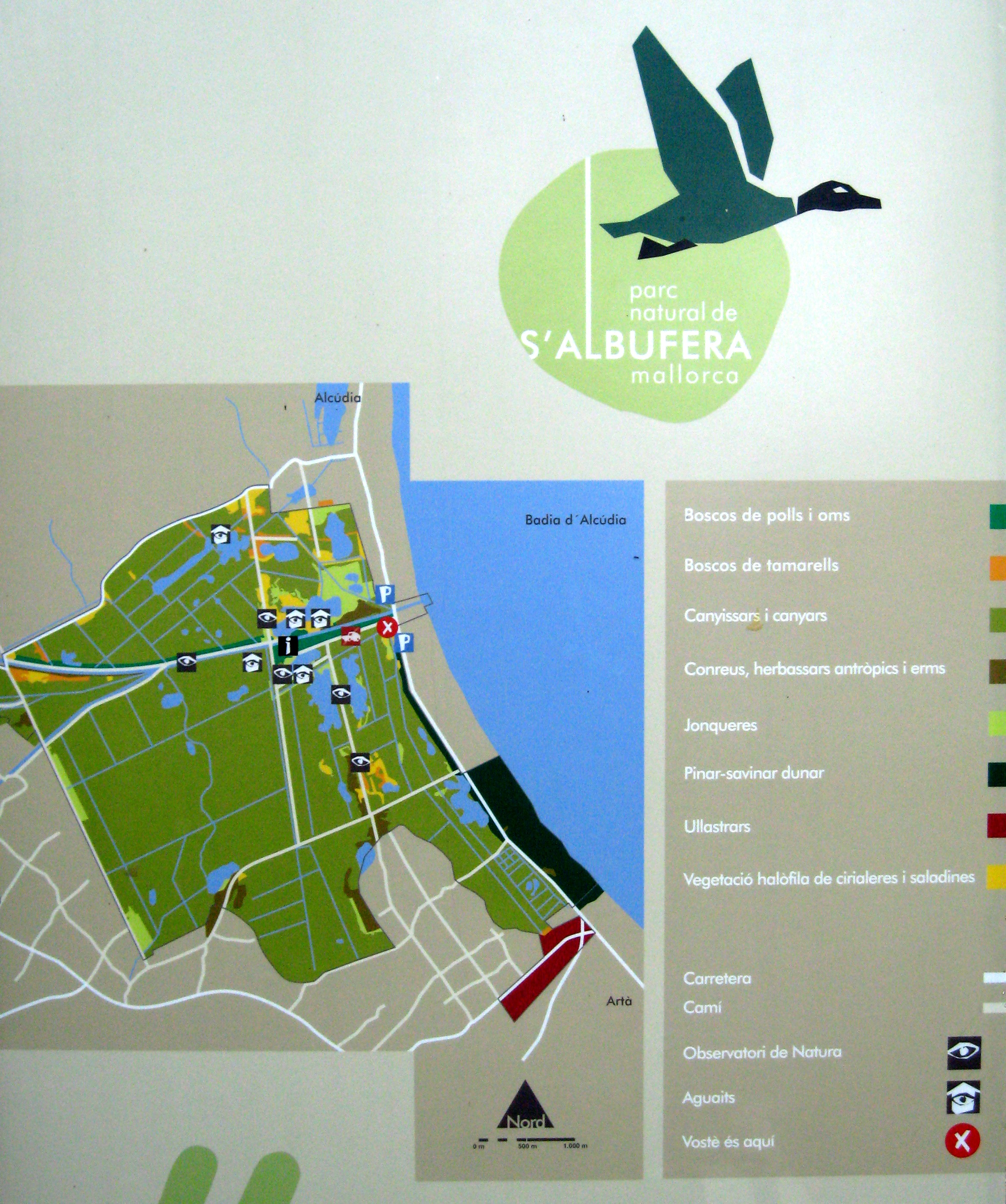 Hinweisschild zum Parc natural de s’Albufera de Mallorca, Gemeinde Muro, Mallorca, Spanien